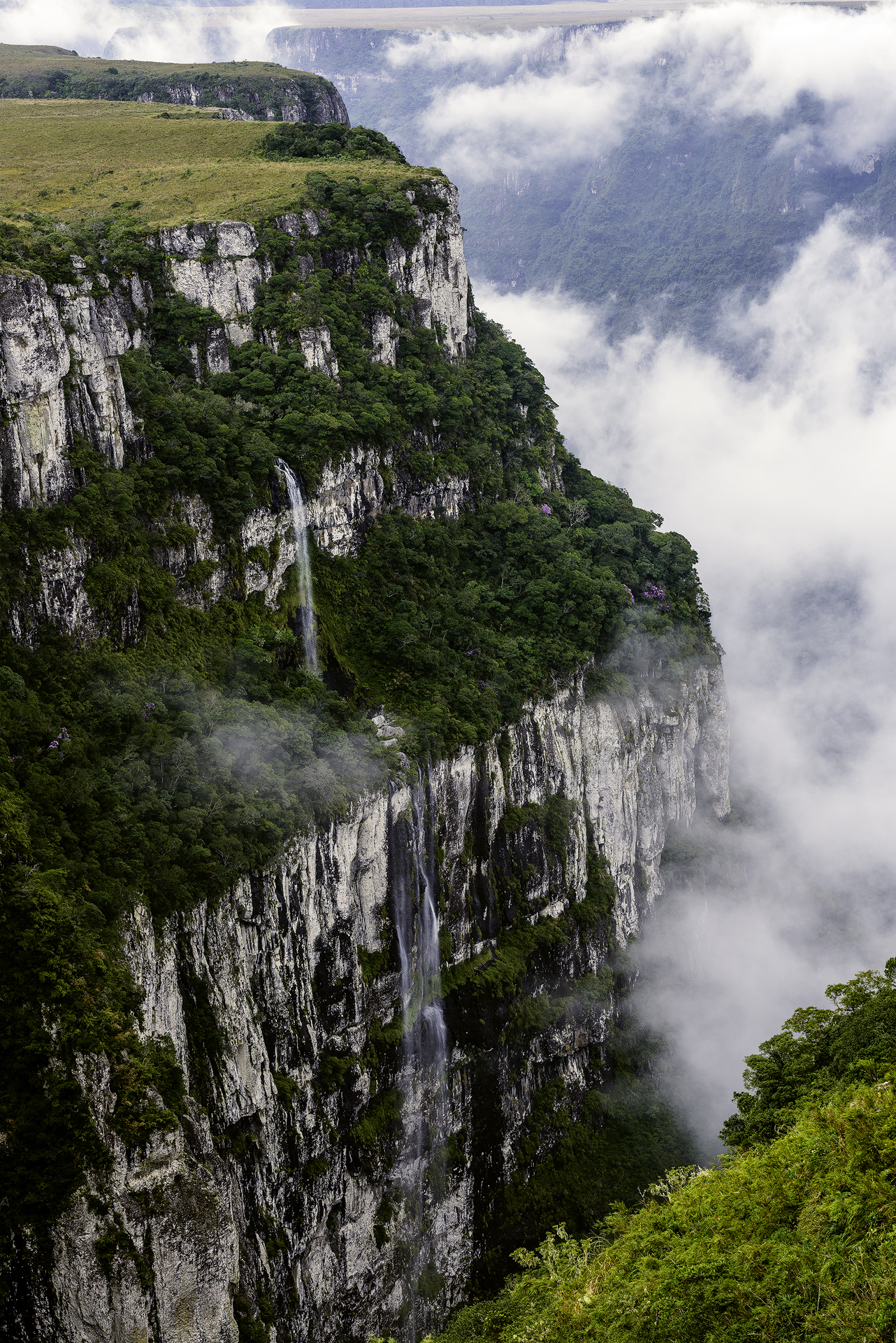 Vista do Canyon Fortaleza e suas cascatas